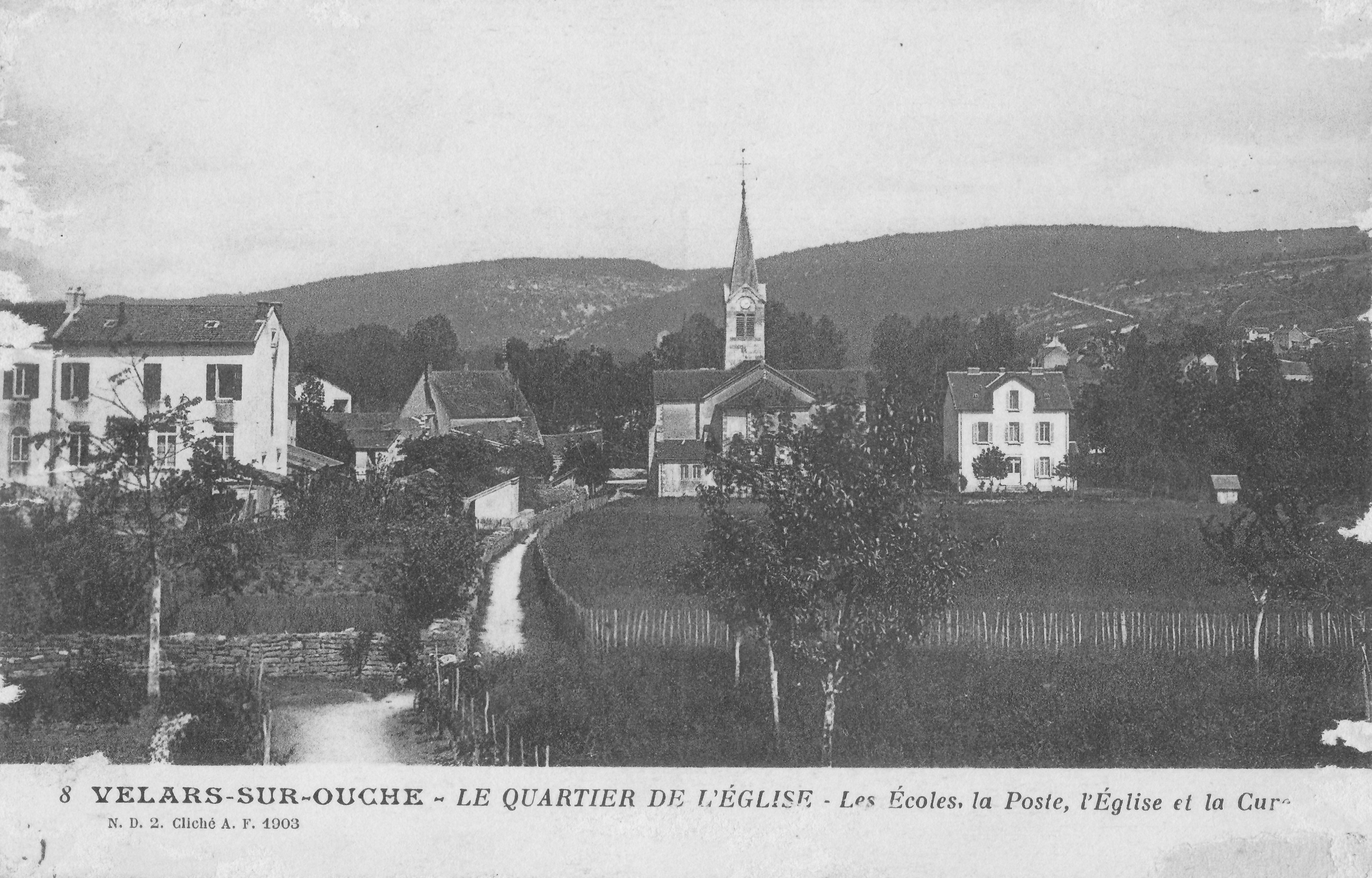 Carte postale ancienne montrant le quartier de l'église de Velars-sur-Ouche